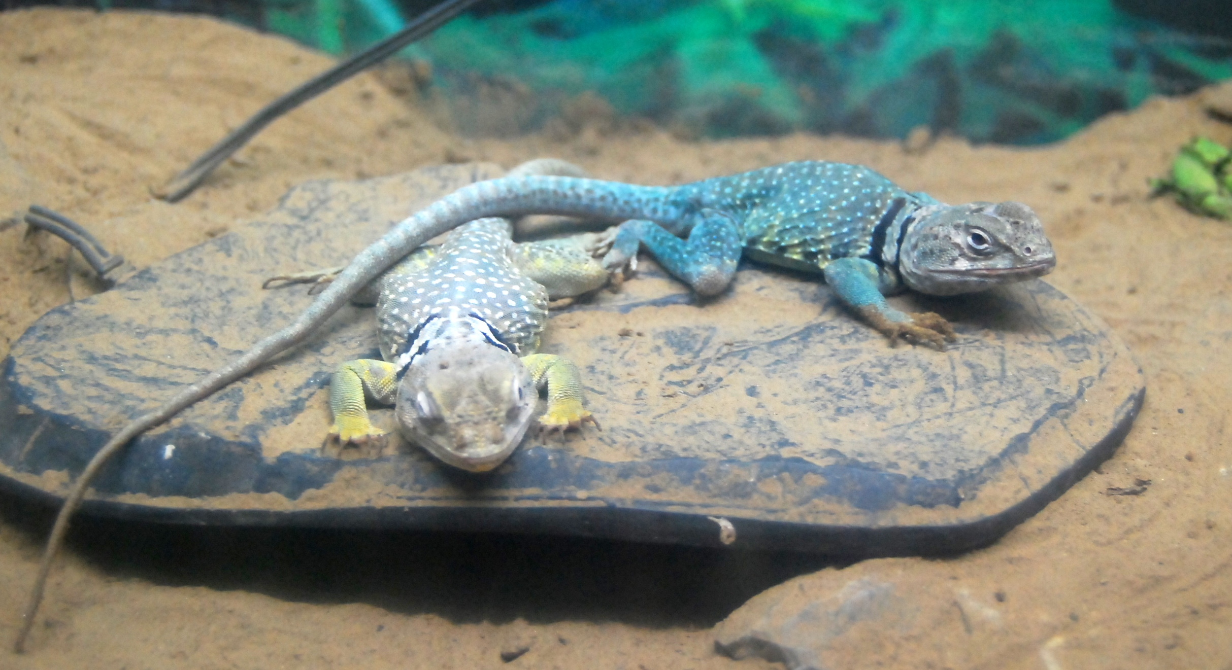 北京动物园的环颈蜥